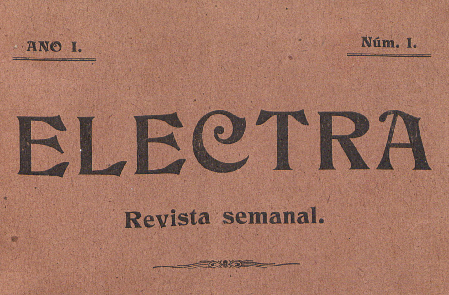 Parte de la portada de la revista Electra.